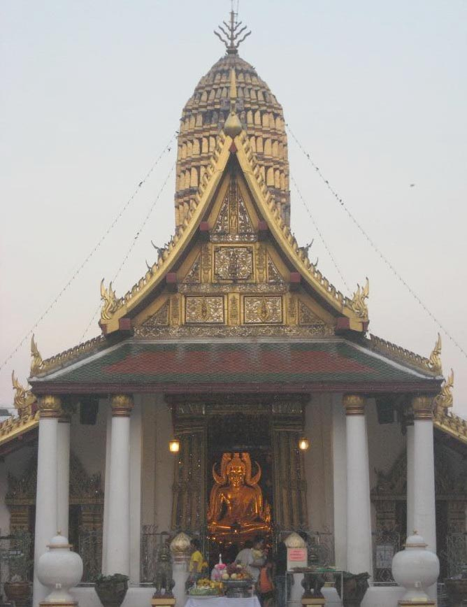 Wat Phra Sri Ratanamahatat.Phitsanulok,Thailand.